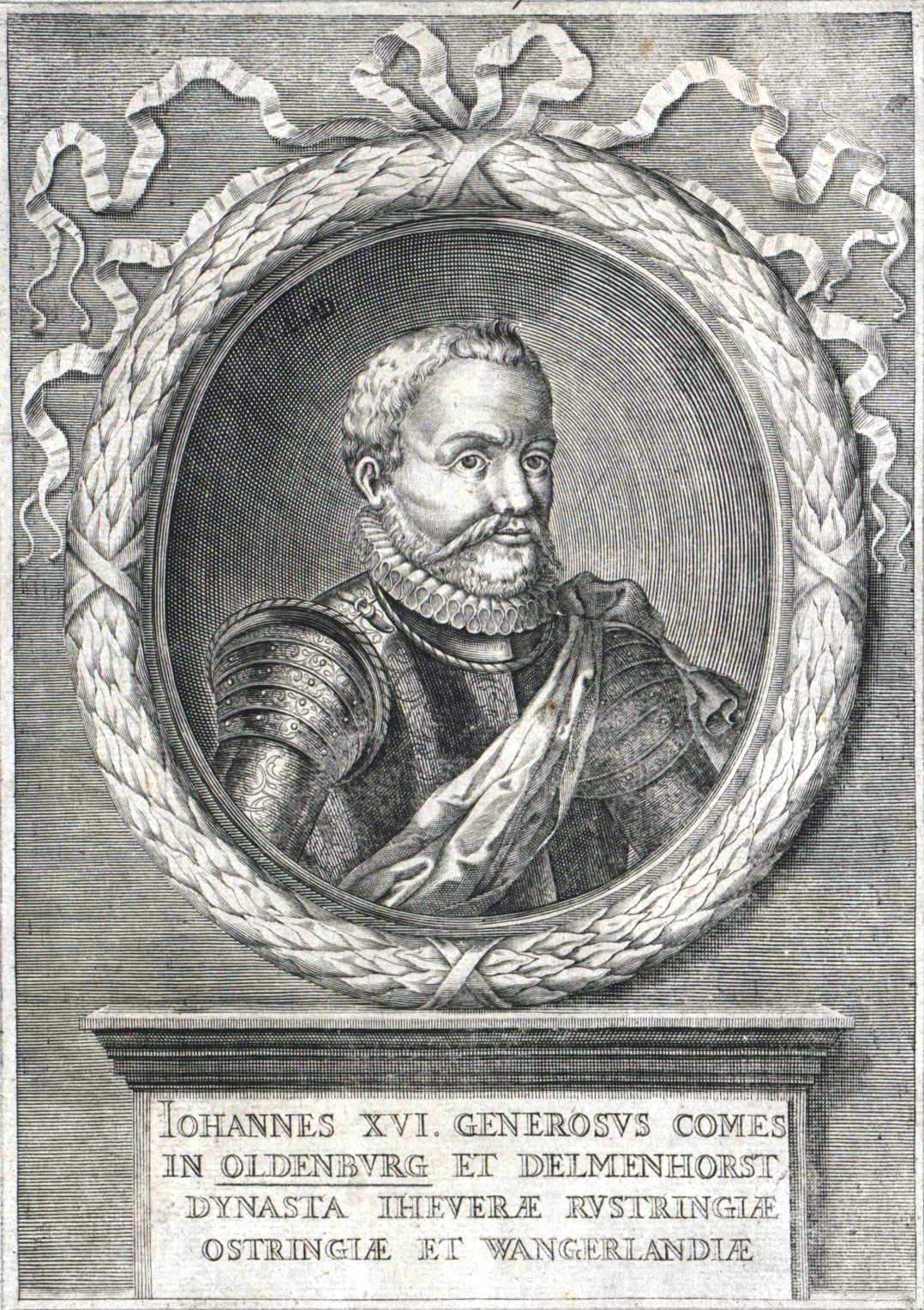 Graf Johann VII. (frühere Zählung: XVI.) von Oldenburg (1540–1603)